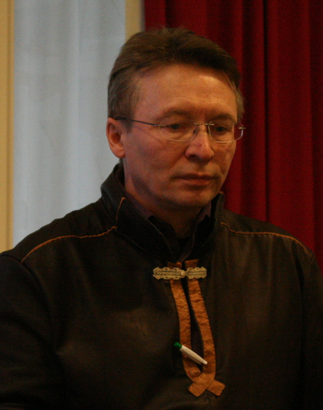 Lars-Andes Baer, Sámiid Riikabellodat (Samelandspartiet)